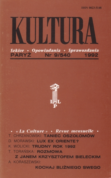 Cover der polnischen Exilzeitschrift Kultura, Nr. 9/540, 1992.